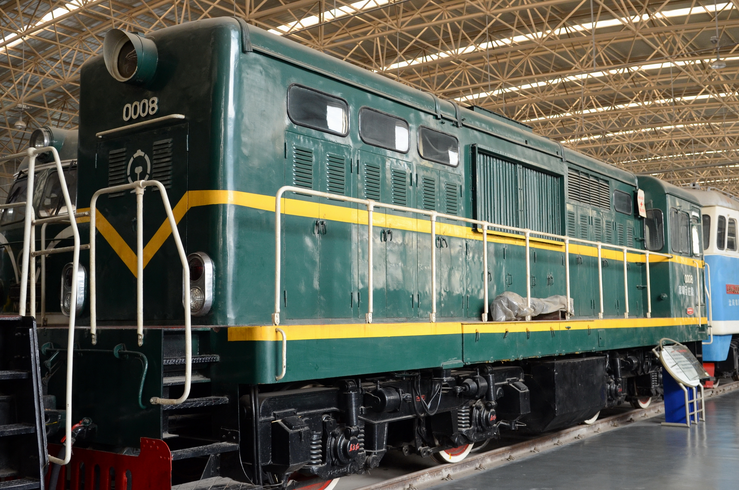 东方红2型 0008号车保存在中国铁道博物馆